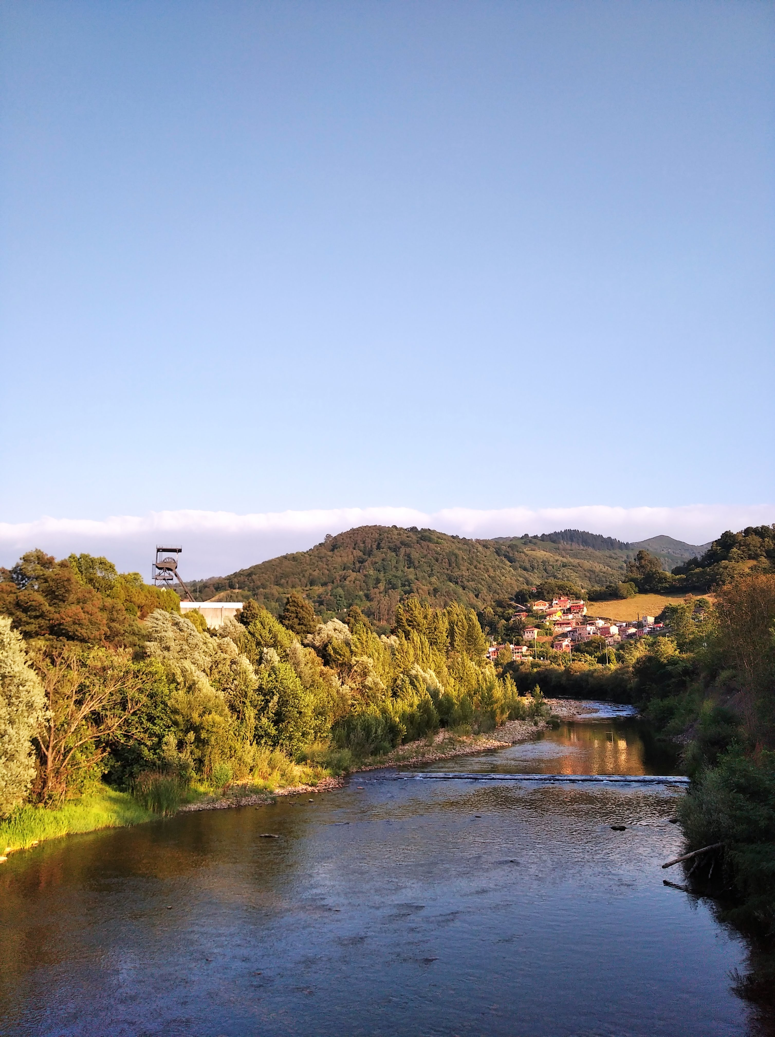 Museo de La Minería de Asturias y río Nalón en el límite entre los concejos de Langreo y San Martín del Rey Aurelio, España